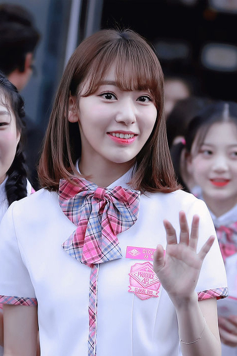 180510 상암 미야와키 사쿠라